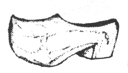 wooden shoe